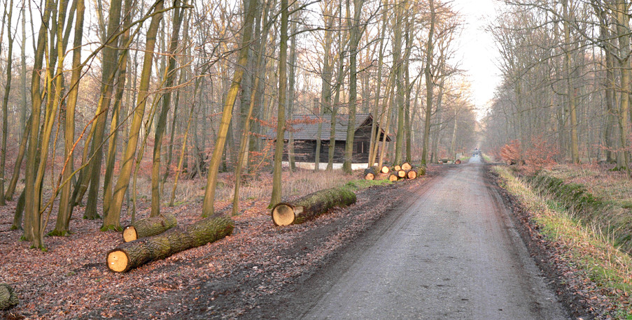 Hämeler Wald Waldweg, Foto aufgenommen von Benutzer Benutzer:AxelHH, Februar 2007